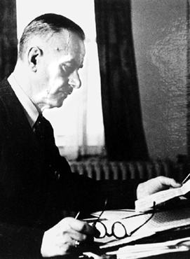 Conferencia dictada a los estudiantes de la Universidad de Princeton (USA) el 10 de mayo de 1939